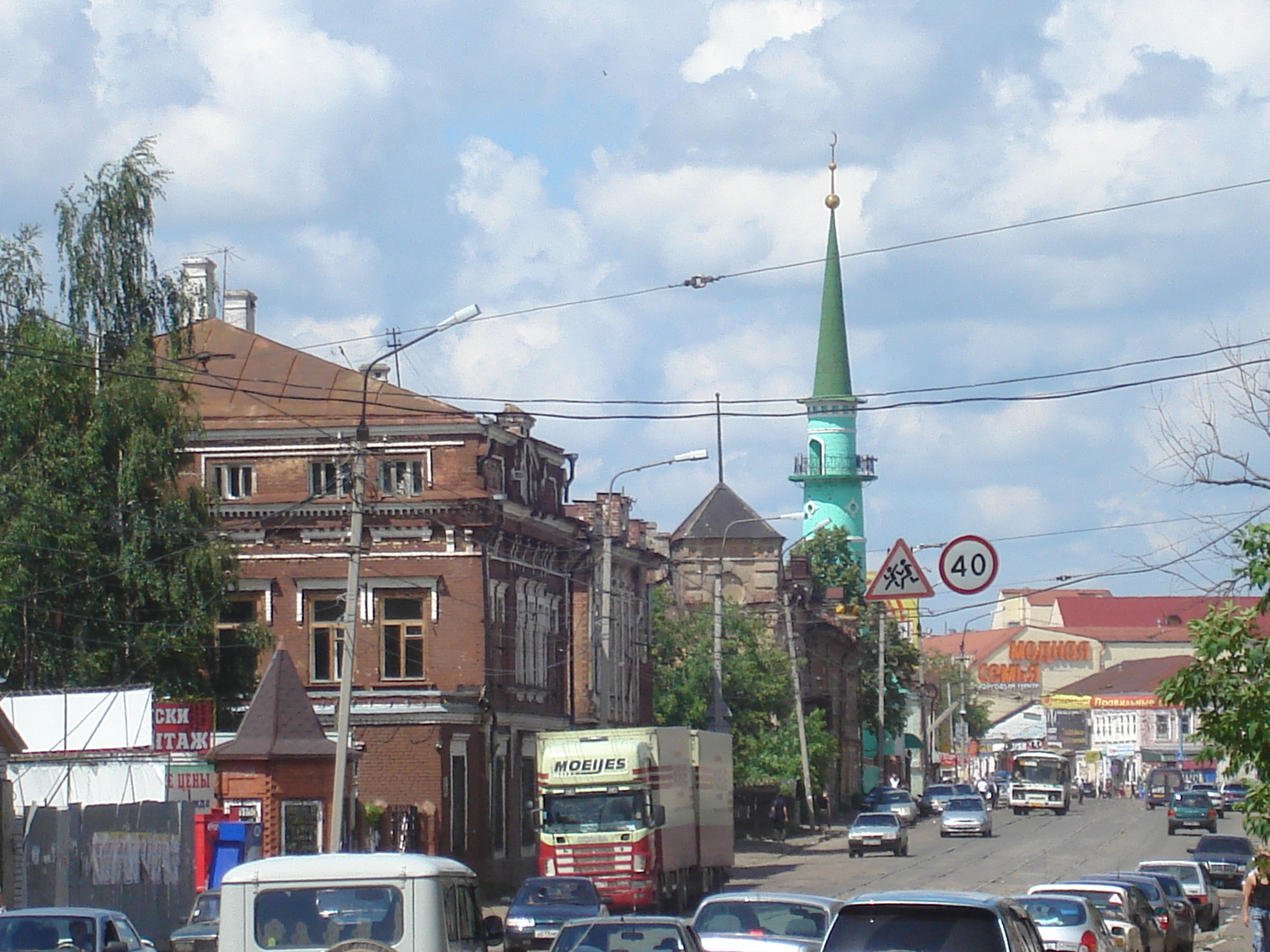 Soltan mäçete